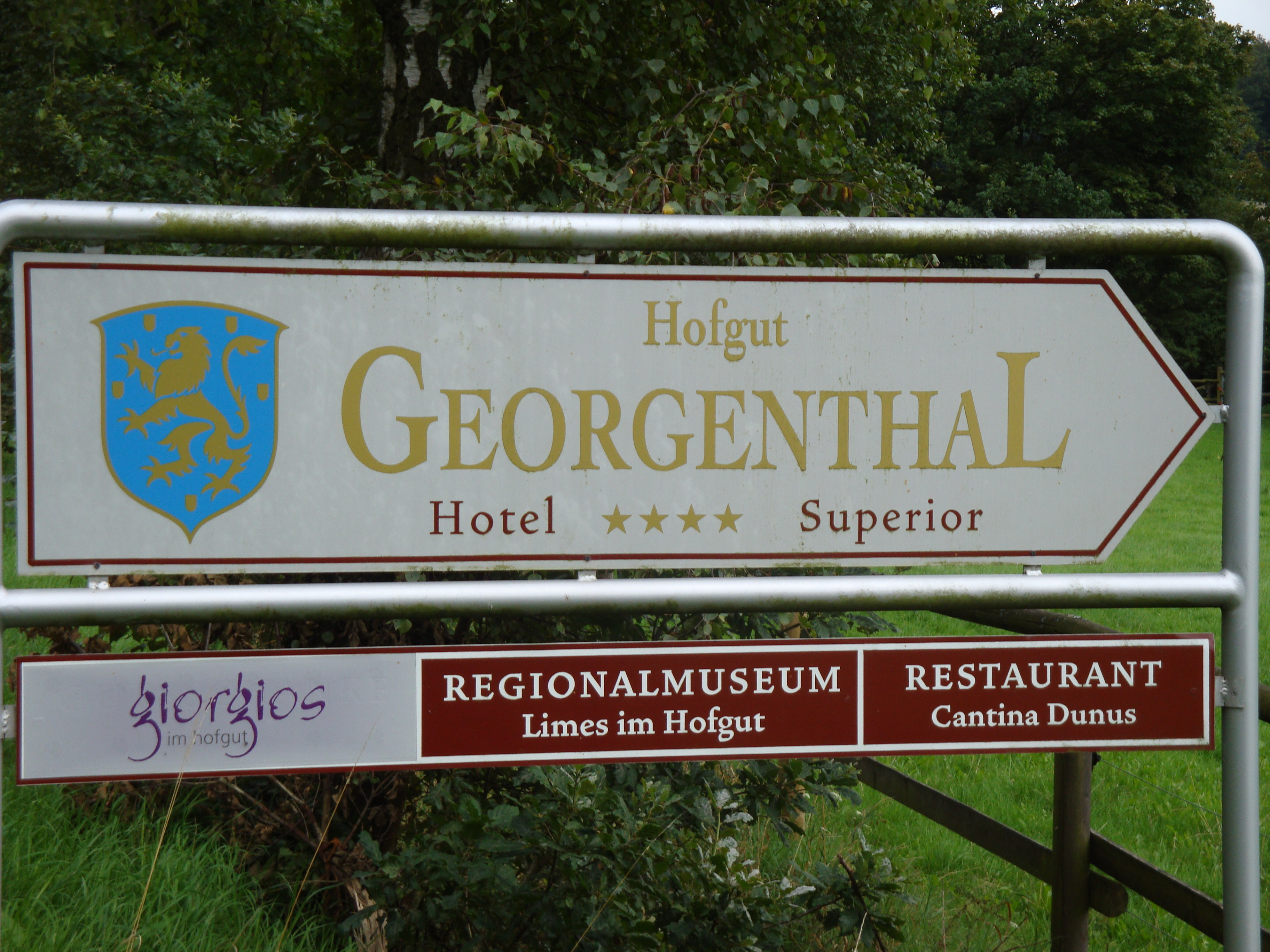 Hinweisschild zum Hofgut Georgenthal im Rheingau-Taunus-Kreis